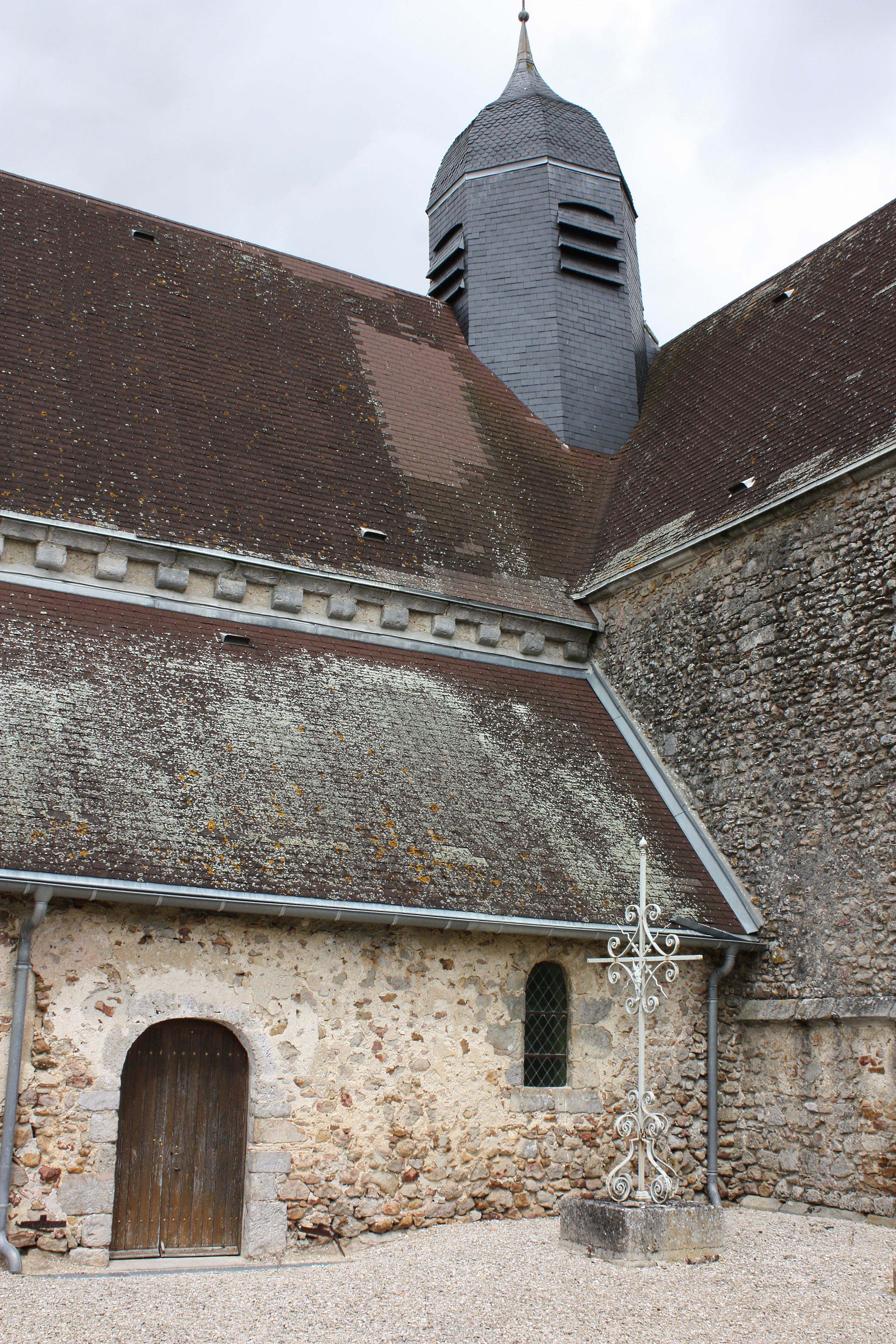 Saint-Quentin-le-Verger - Eglise Saint-Quentin Vue du Sud